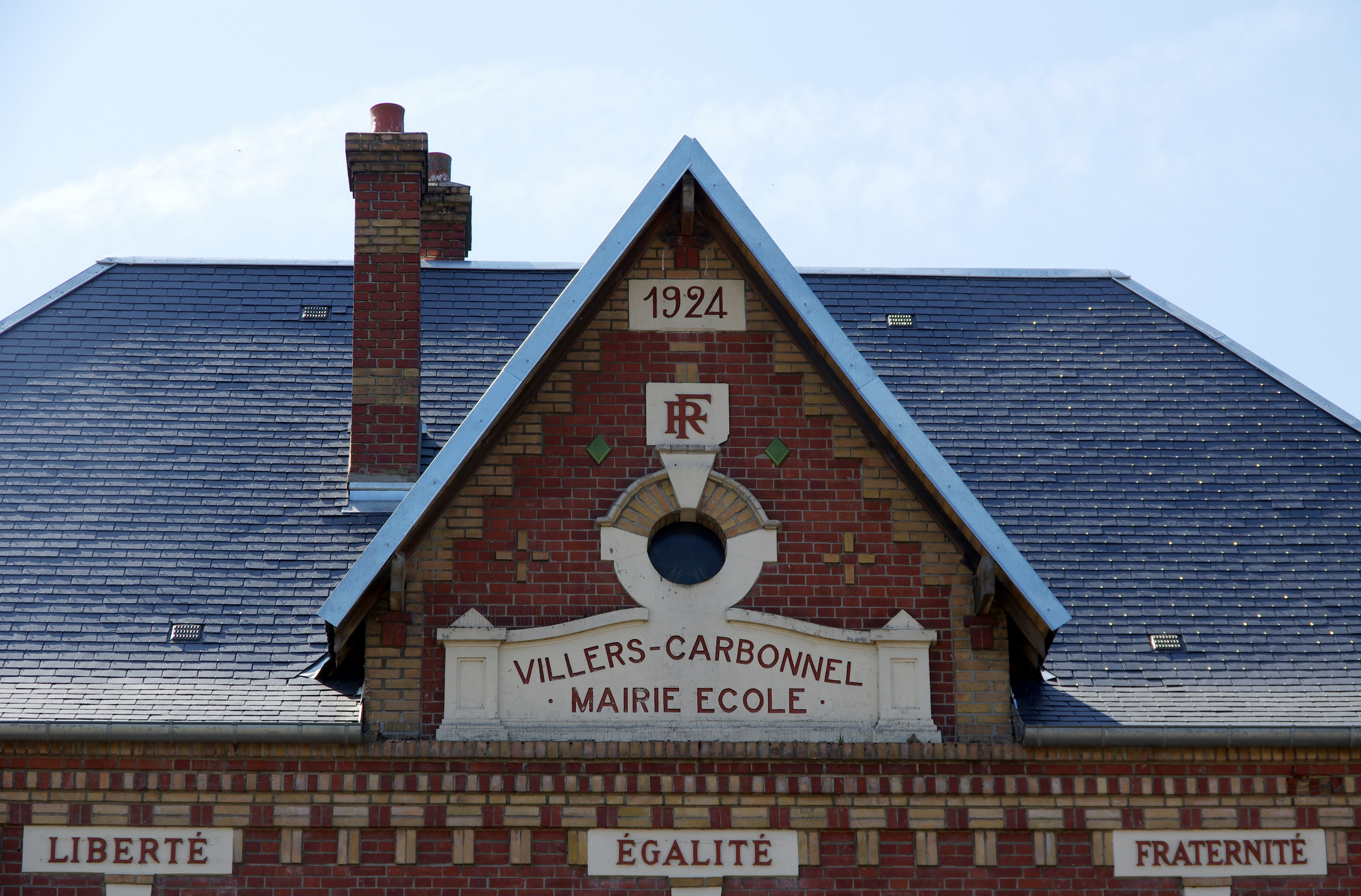 Villers-Carbonnel (Somme, France) - Le fronton de la "mairie-école". Remarquez-vous ces 2 petits losanges verts, en céramique ? ... de part et d'autre du sigle RF ... Un exemple parmi d'autres de l'architecture de la "Reconstruction", après la "Grande Guerre", qui a particulièrement anéanti des dizaines et des dizaines de villages de la région. .